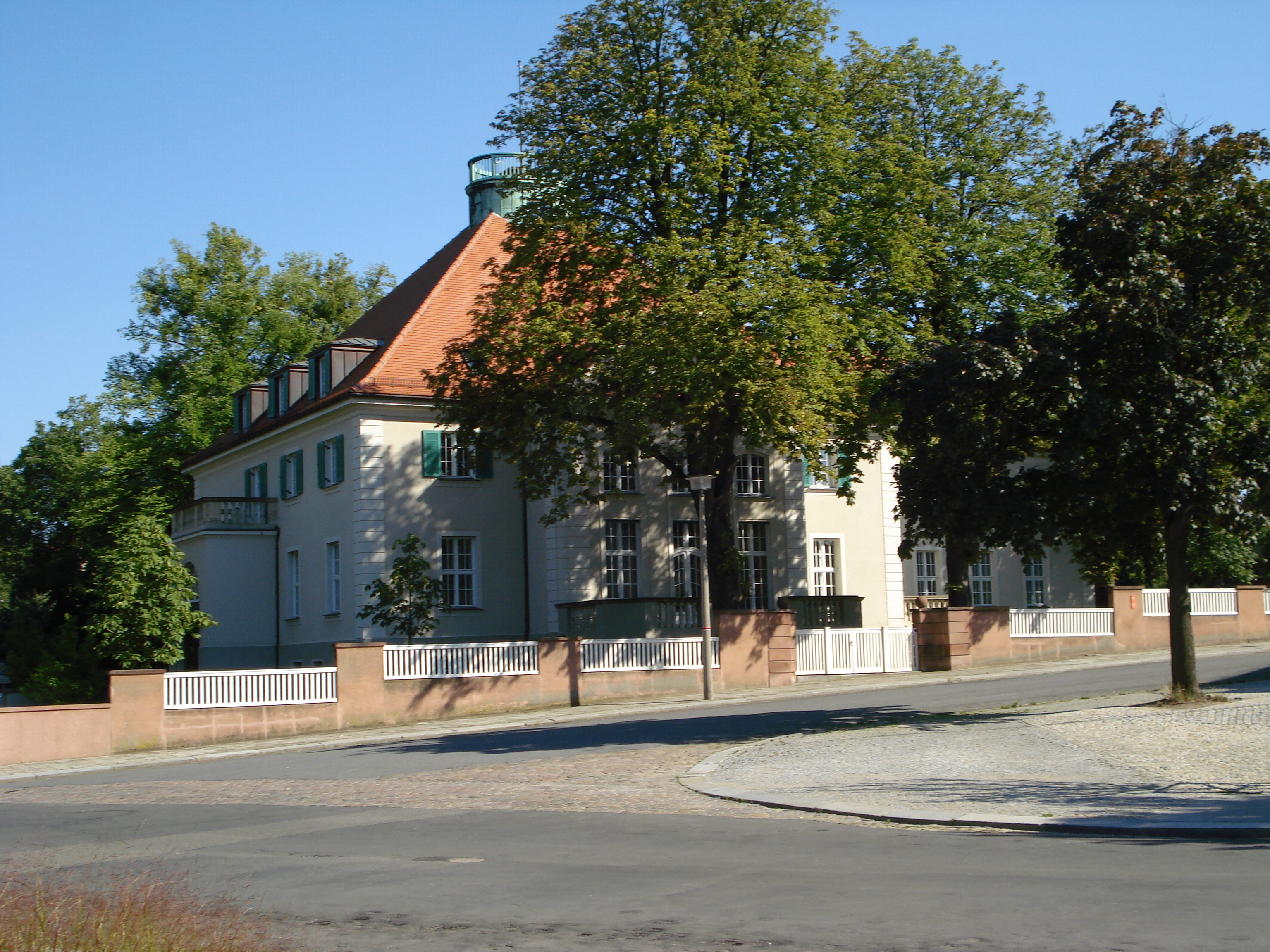 TU Dresden, Rektorat, Ecke Mommsenstraße/Dülferstraße